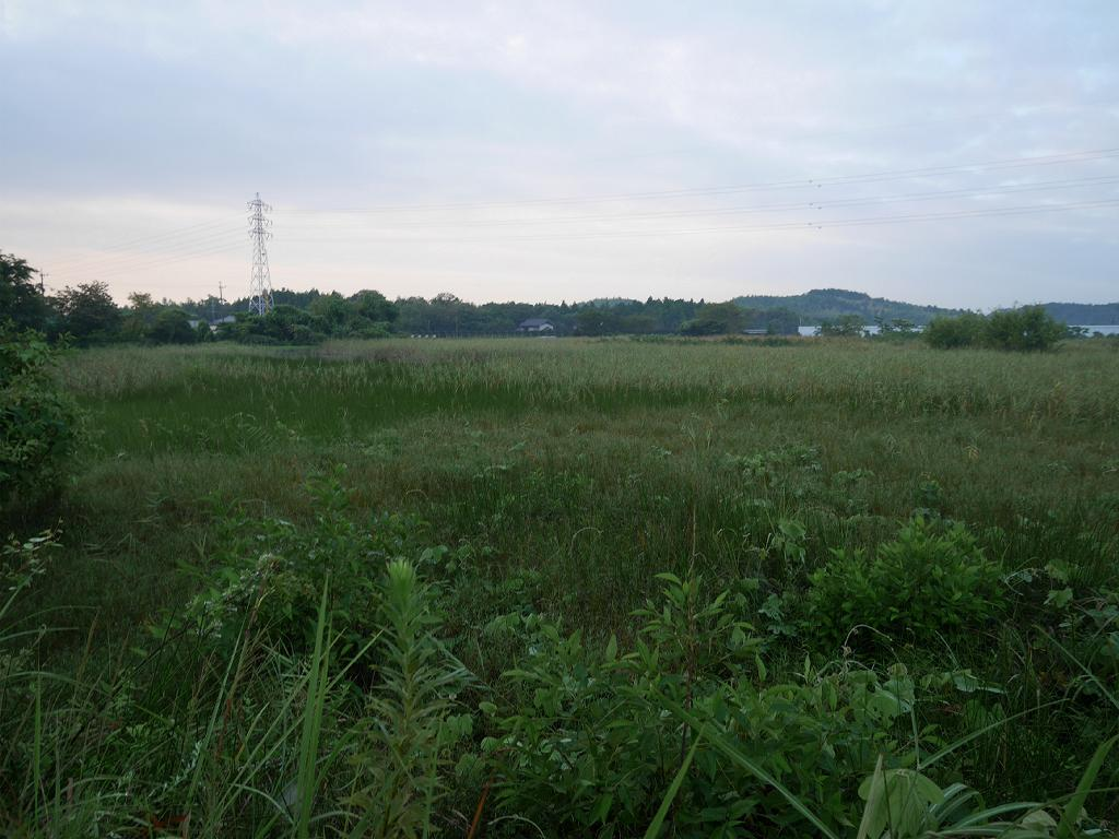 2019/09/02 三重県四日市市：Yokkaichi City, Mie Pref., Japan